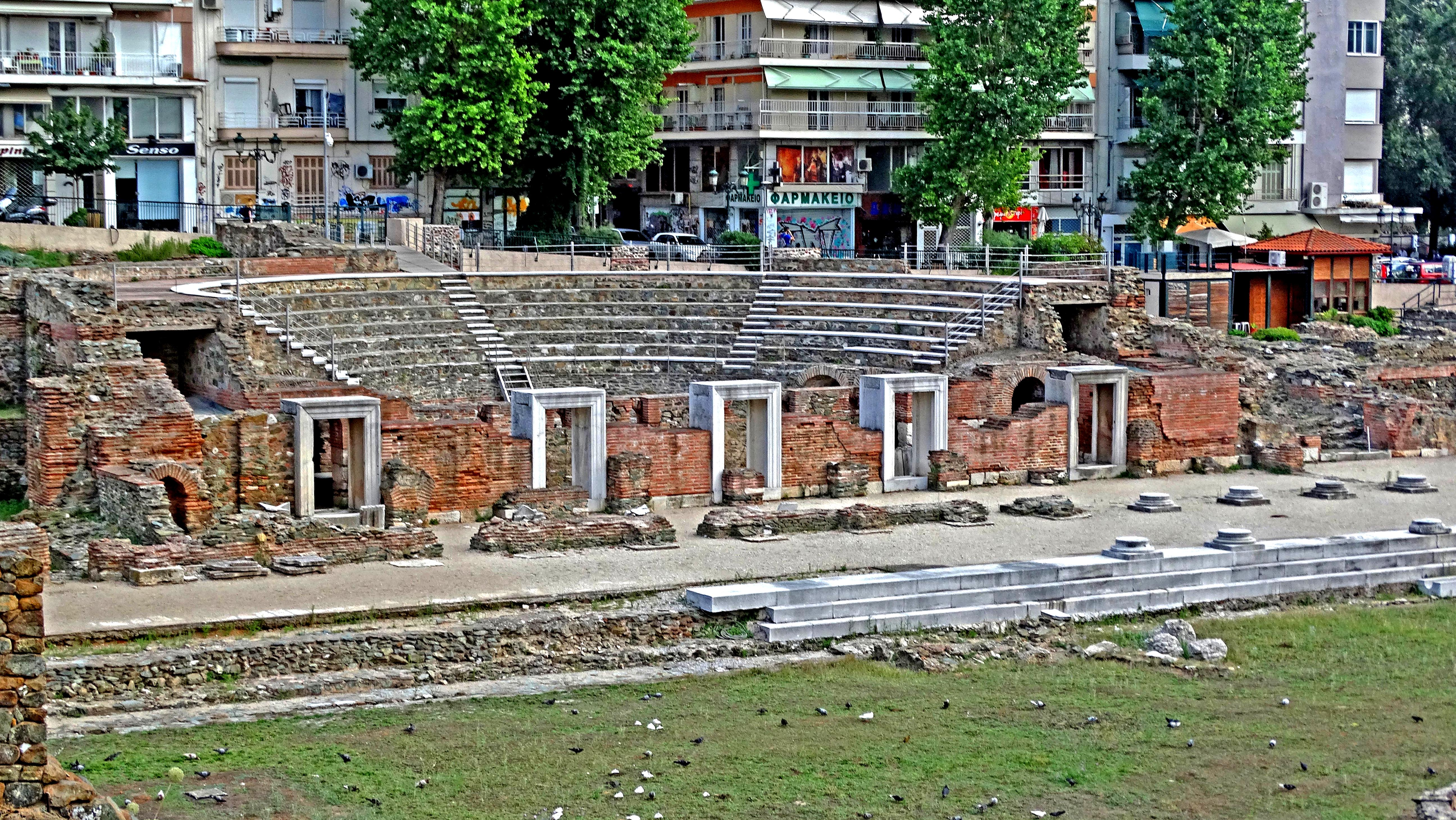 Ρωμαϊκή Αγορά της Θεσσαλονίκης...